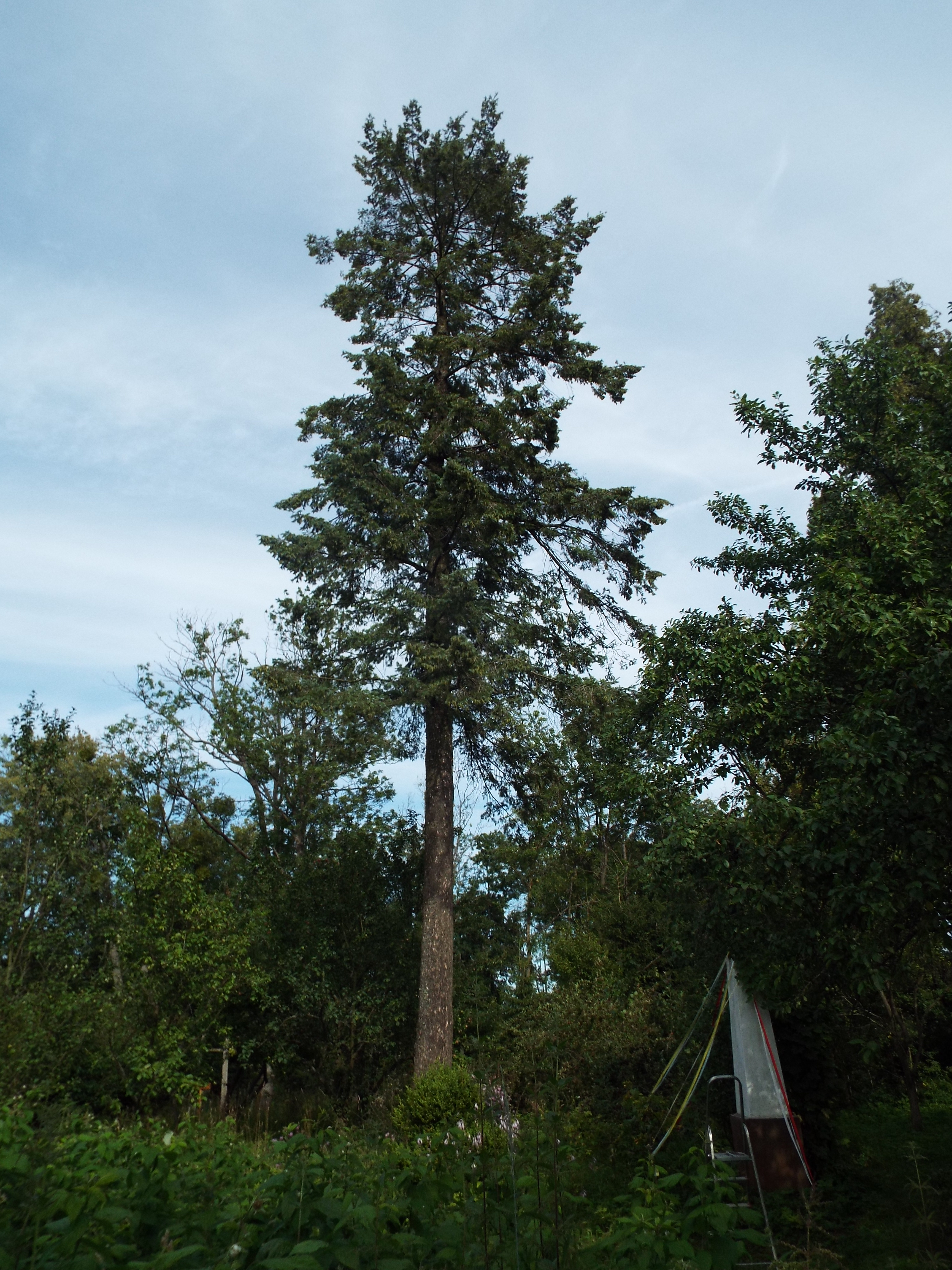 Daglezja w Brzezinie